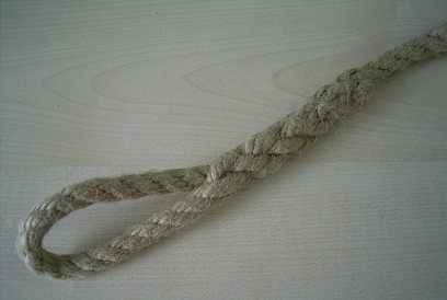 Ein Augspleiß (Schifferknoten, Schlaufe)